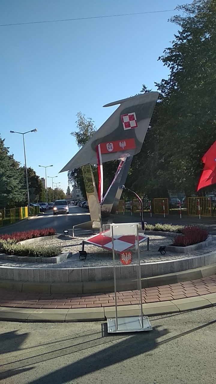 Rondo im. płk. Wacława Króla chwilę przed jego oficjalnym otwarciem.